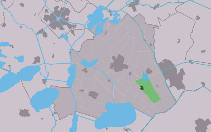 Kaartsje fan himrik fan Sint_Jansgea